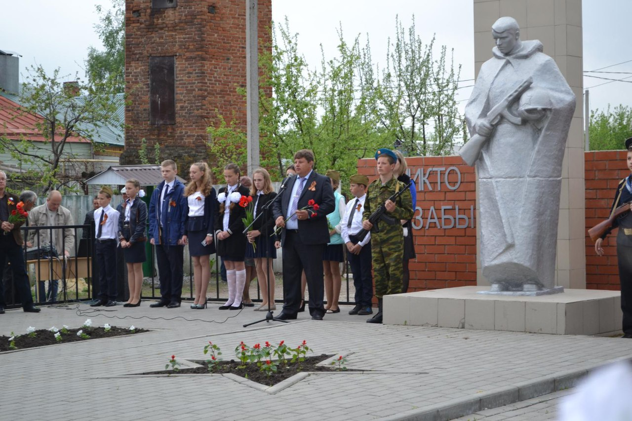 Открытие мемориала ВОВ в Новопокровке